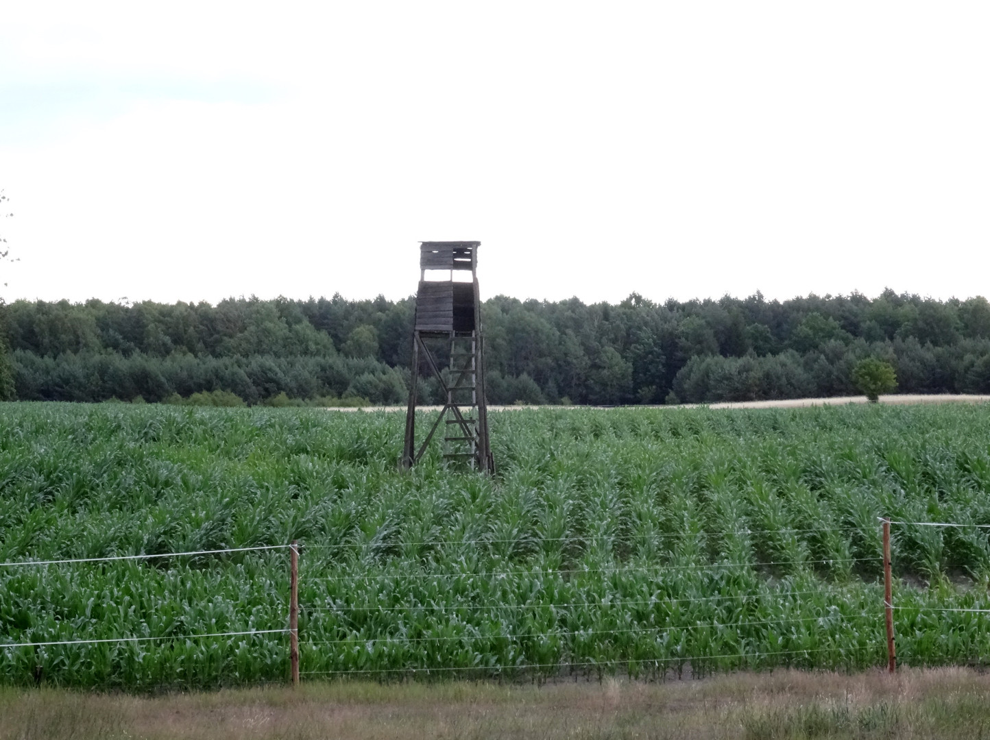 Osada leśna Dębinka w Puszczy Bydgoskiej, gmina Nowa Wieś Wielka, powiat bydgoski